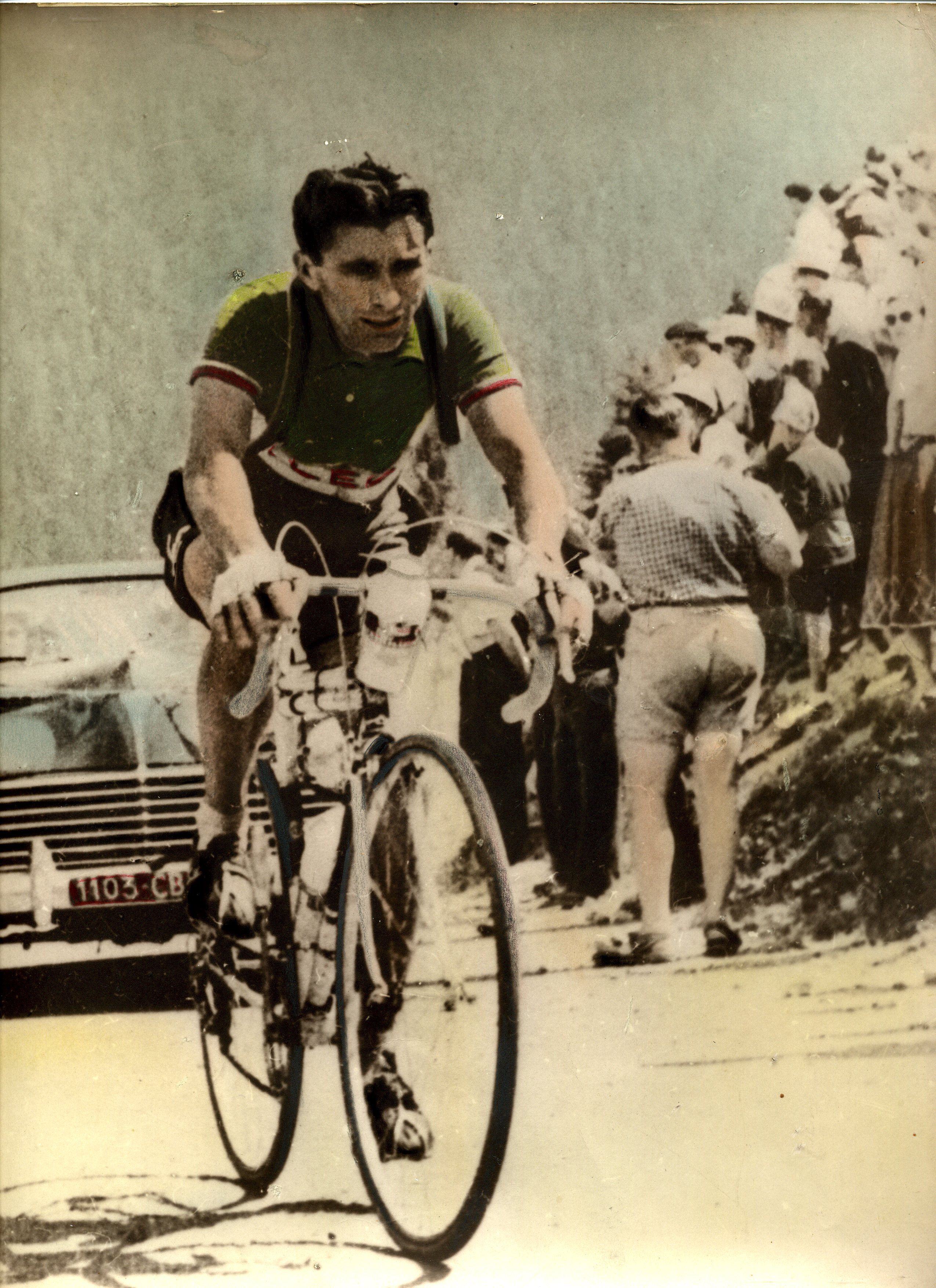 Tour de France 1955. Pietro Giudici, Squadra nazionale Italiana